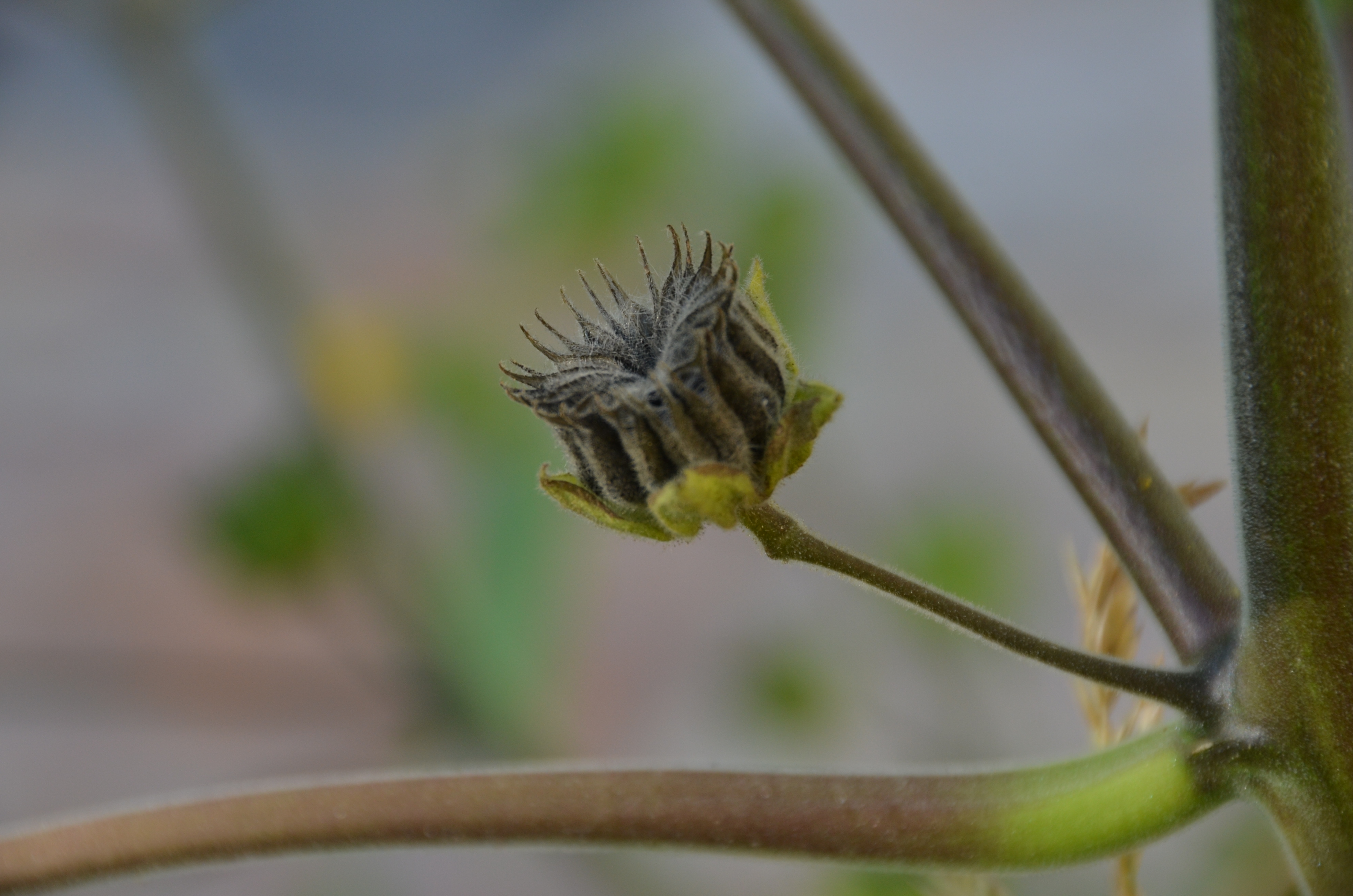 Rozłupnia na roślinie wyrosłej w Kalifornii.